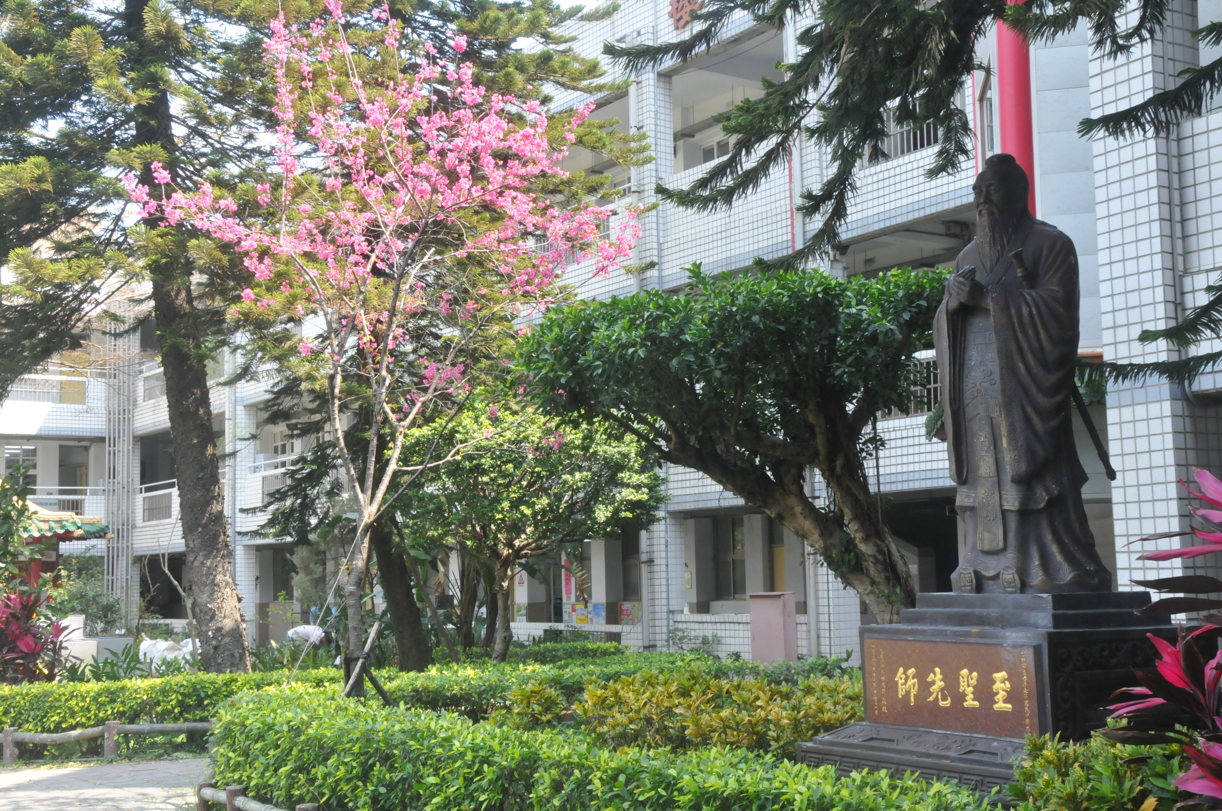 古亭國中一校孔子